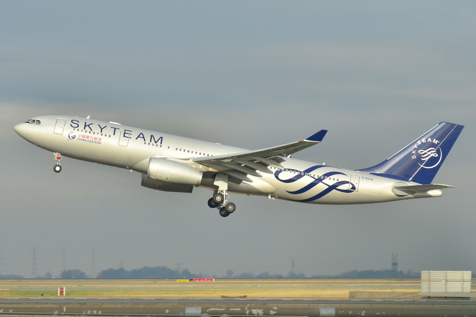 Photo prise à l'aéroport de Roissy-Charles de Gaulle (LFPG) en France. Picture take at Roissy-Charles de Gaulle Airport (LFPG) in France.